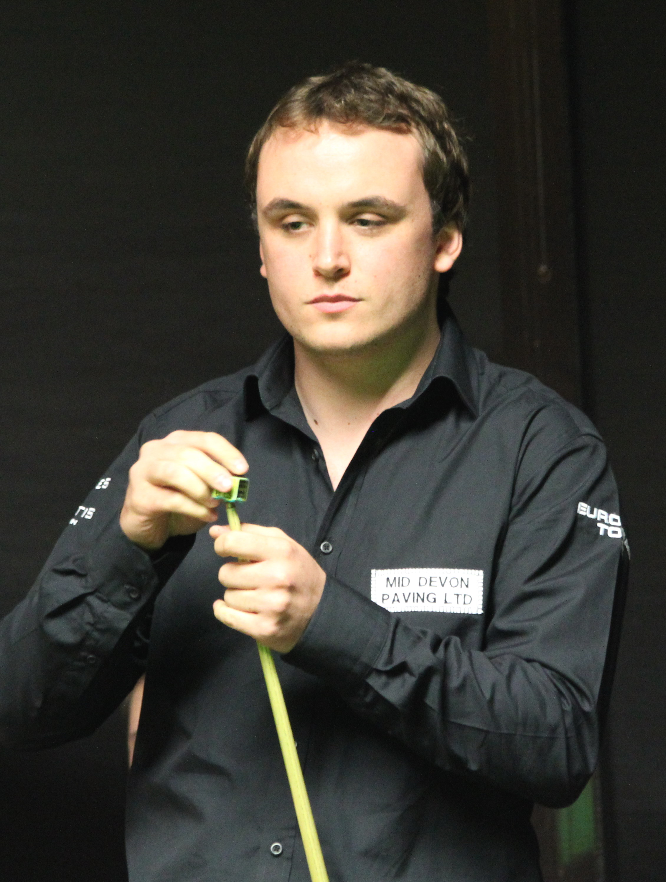 Sam Baird beim Paul Hunter Classic 2014